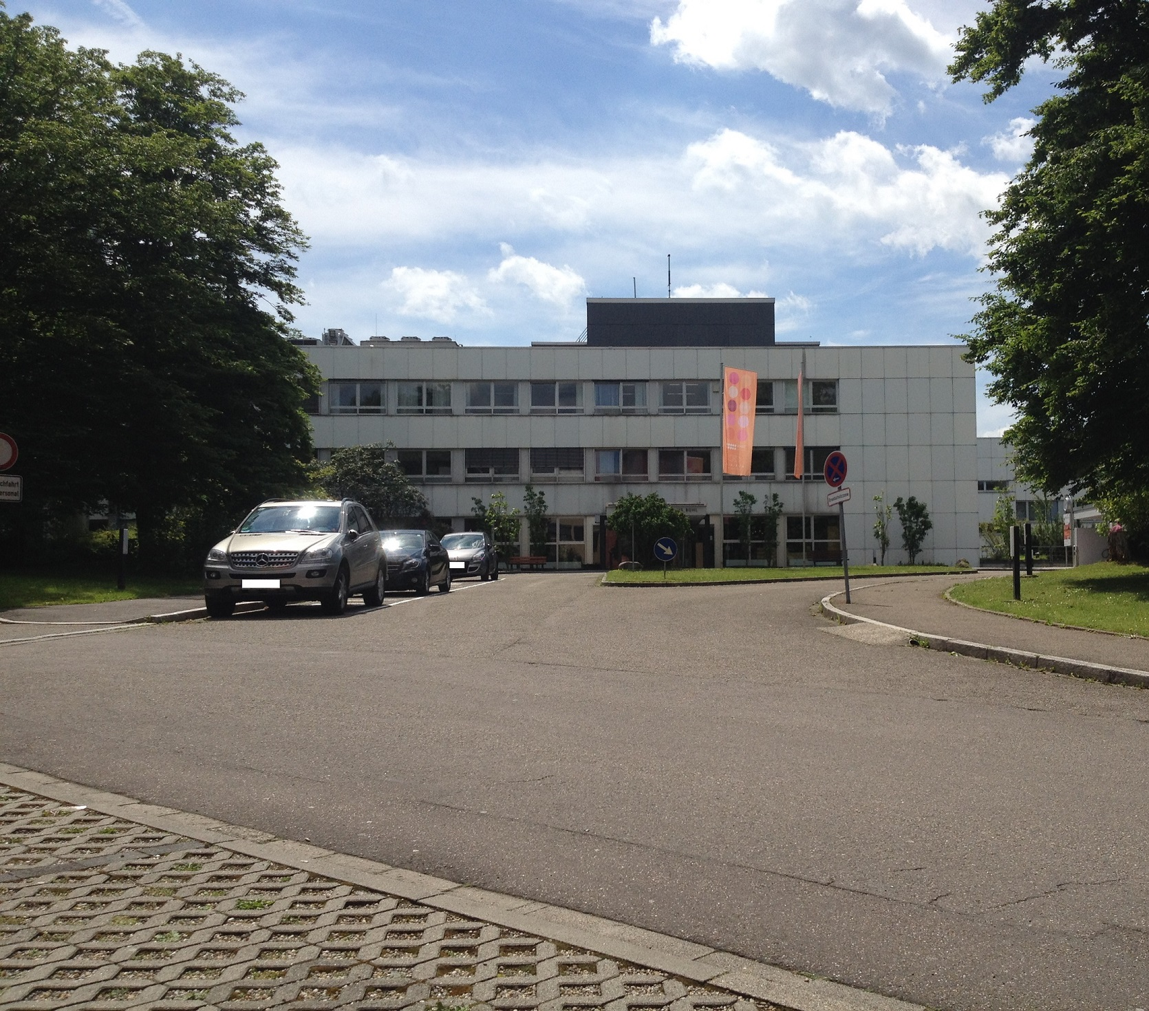 Klinikum Mittelbaden Bühl